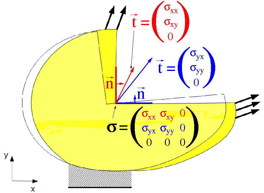 Schnittspannungen in Abhängigkeit von der Normalen an die Schnittfläche. Rot: Normale in x-Richtung, Blau: Normale in y-Richtung